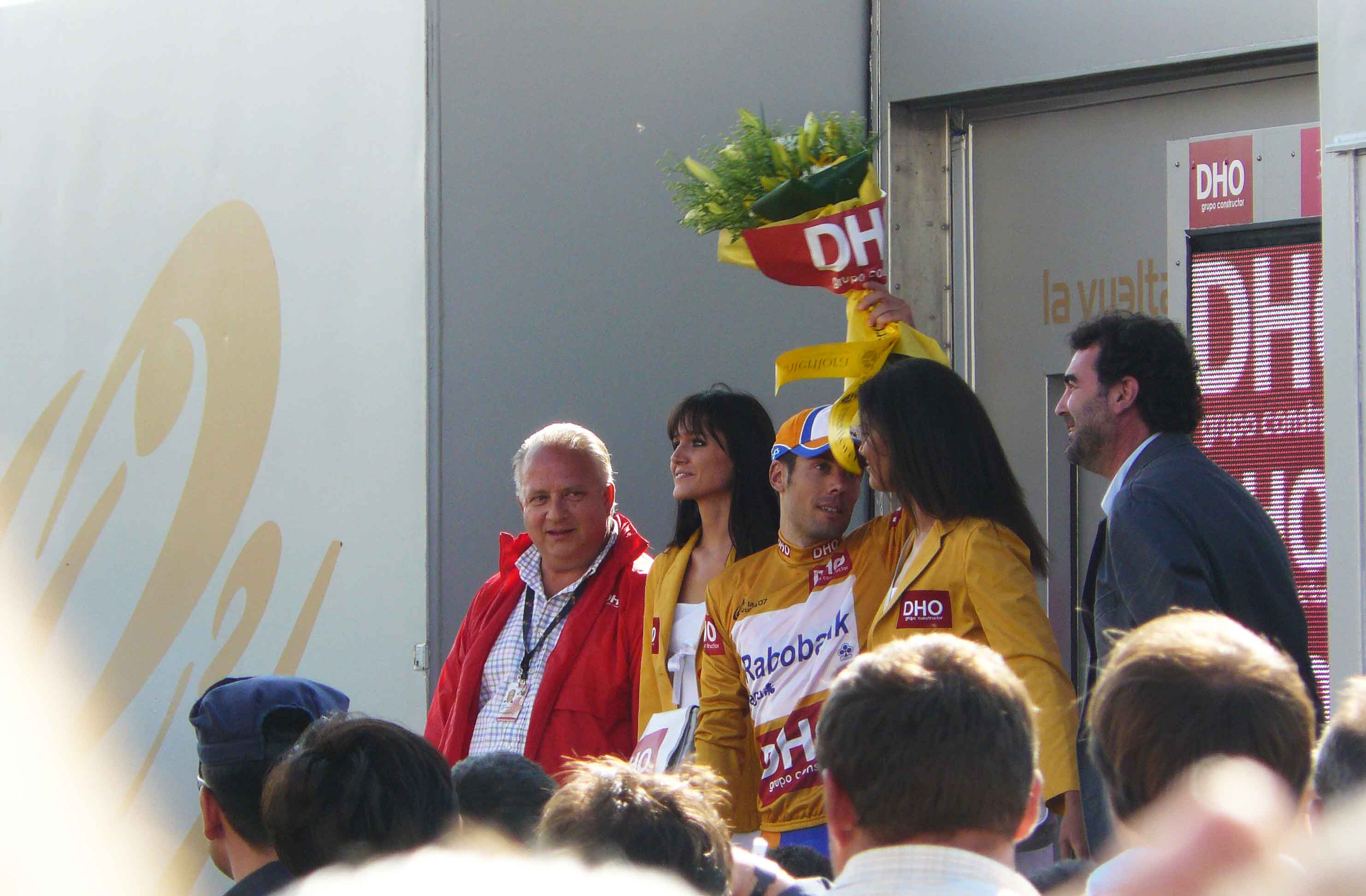 Oscar Freire de amarelo na 2ª etapa da Vuelta ciclista a España 2007